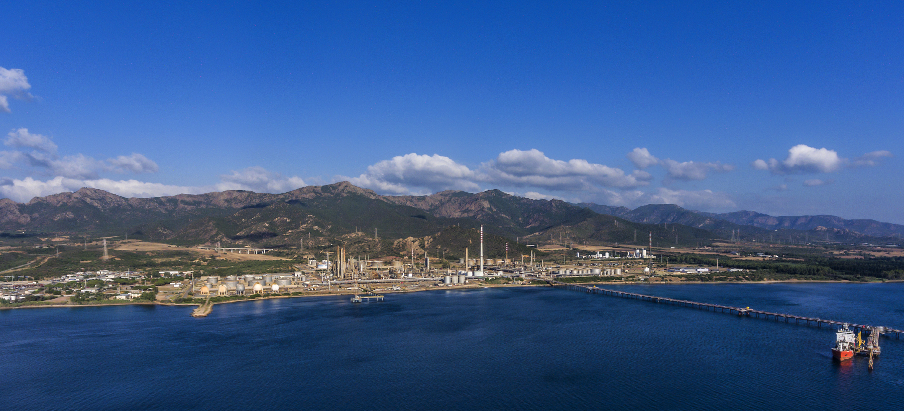 Vista desde el mar de la refinería de Sarlux del Grupo Saras.